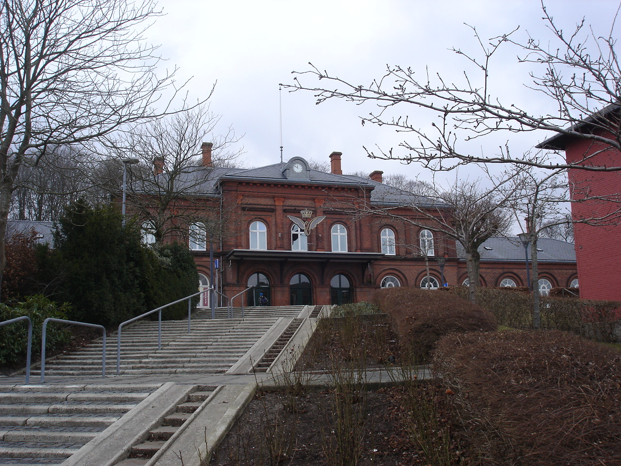 Hobro Station fra Jernbanegade